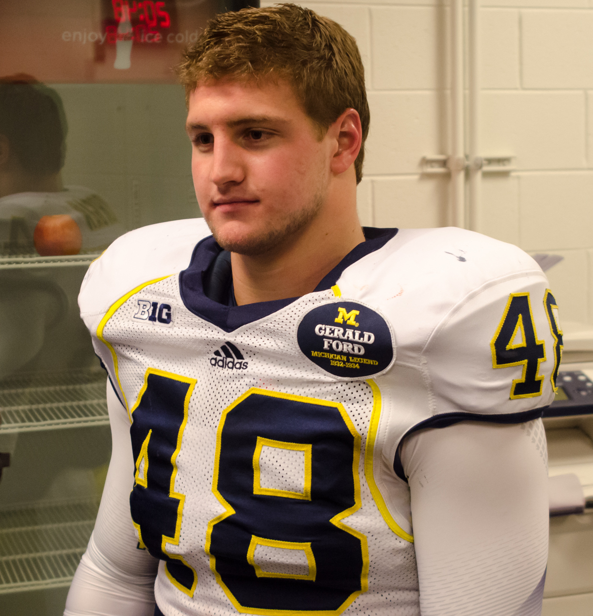 _DSC8511.jpg